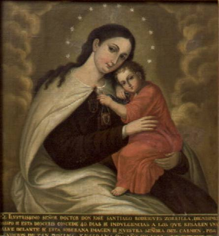 Virgin del Carmen